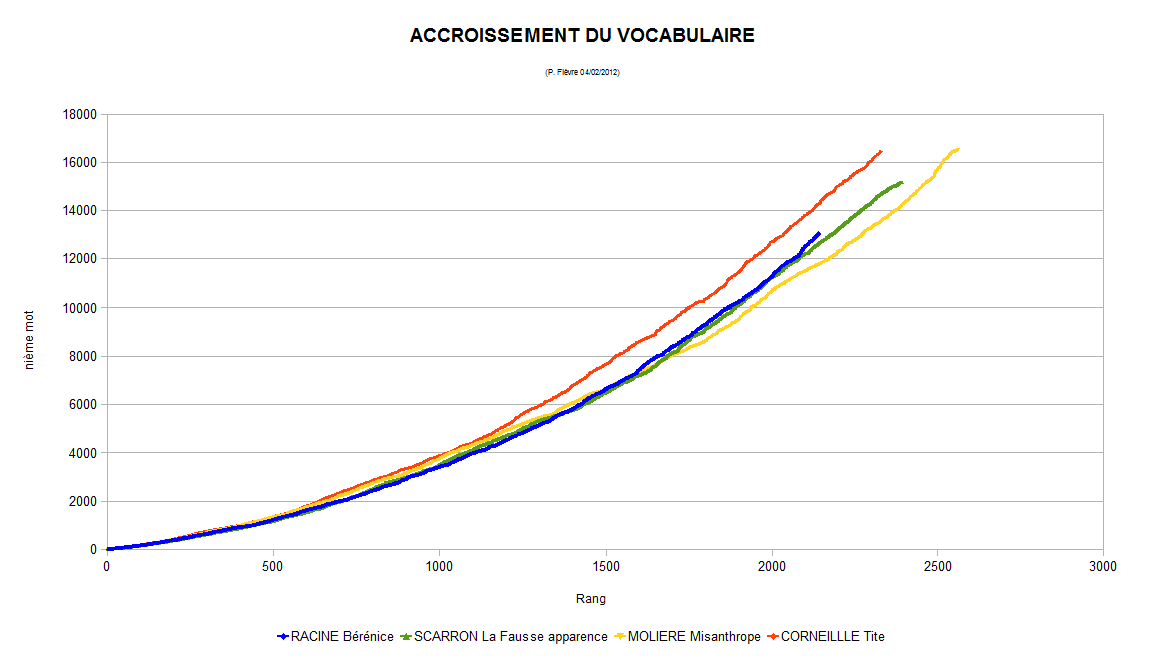 Comparaison des courbes d'accroissement de vocabulaire du Misanthrope de Molière, de Tite de Corneille, de Bérénice de Racine et de La Fausse apparence de Scarron